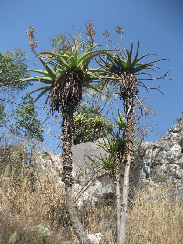 Aloe munchii, Chimanimani, Mozambique.